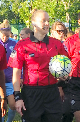 FCKC vs ORLANDO 5-28-16